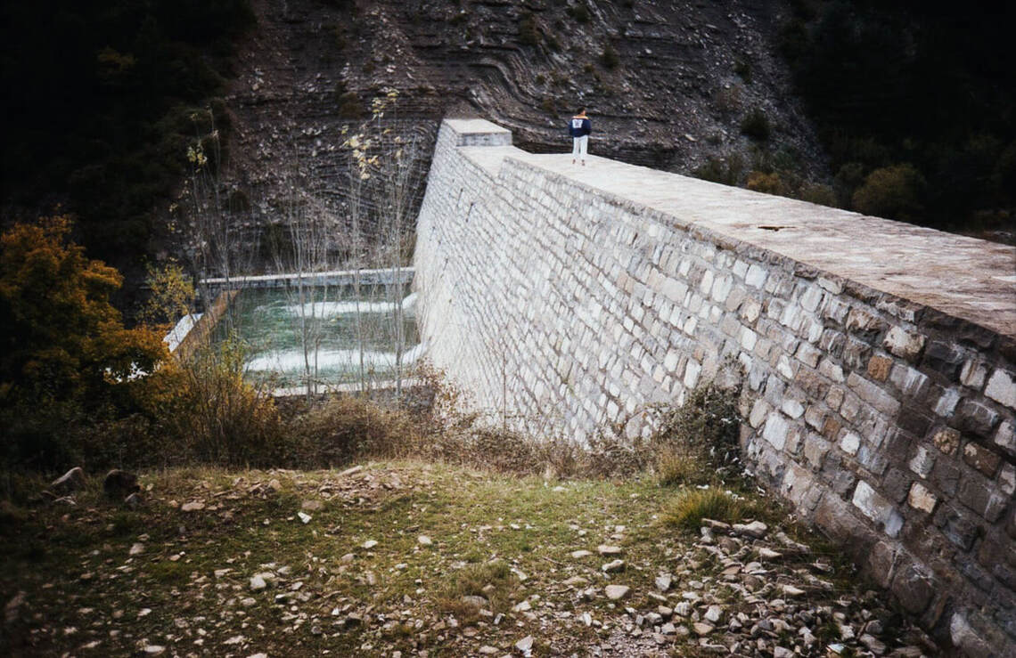 Dique de contención en Orós Bajo, barranco de Os Lucas.